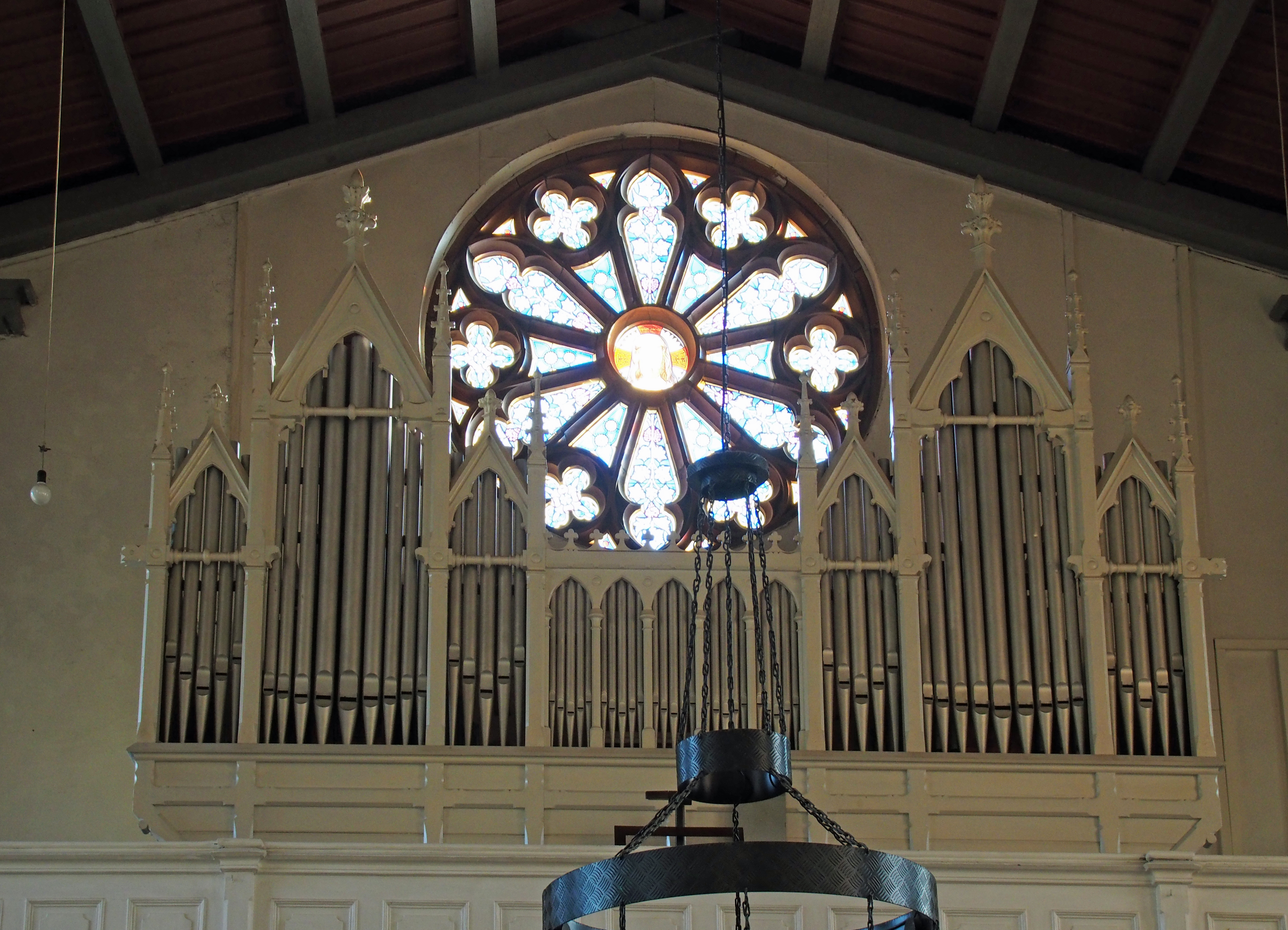 Orgel in der St.-Johannis-Kirche Sassnitz (Rügen)